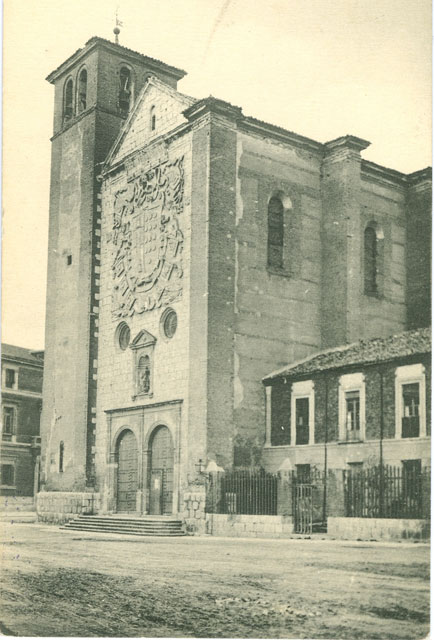 Iglesia de la Magdalena - Valladolid - Postal Color